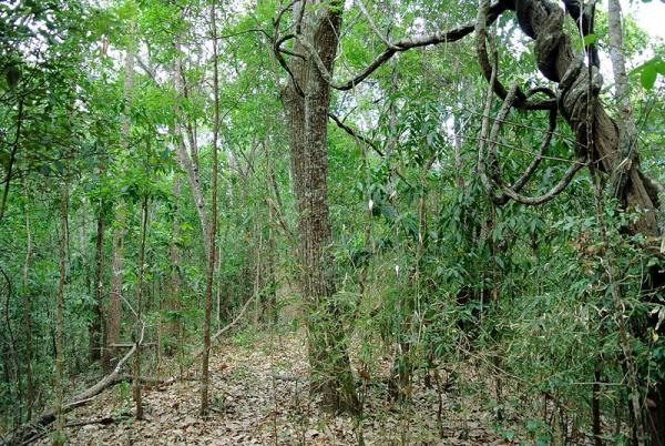 andador con selva seca